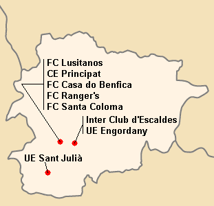 Répartition des clubs en Primera Division 2007-2008.